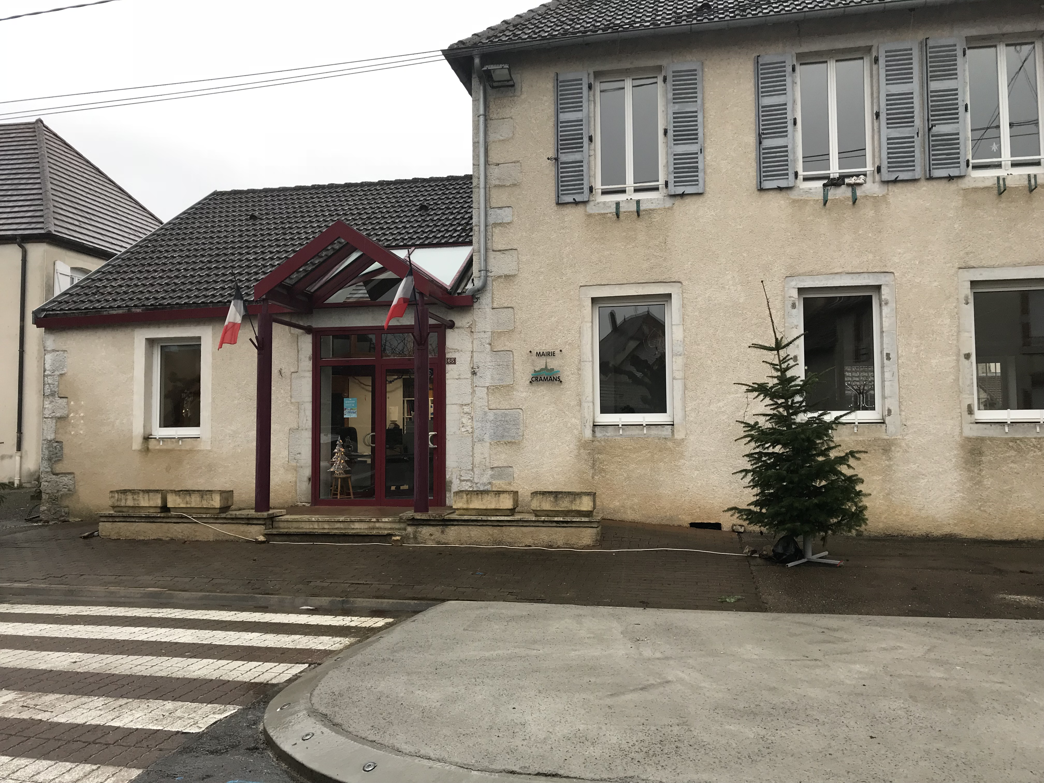 Cramans (Jura, France) en janvier 2018.